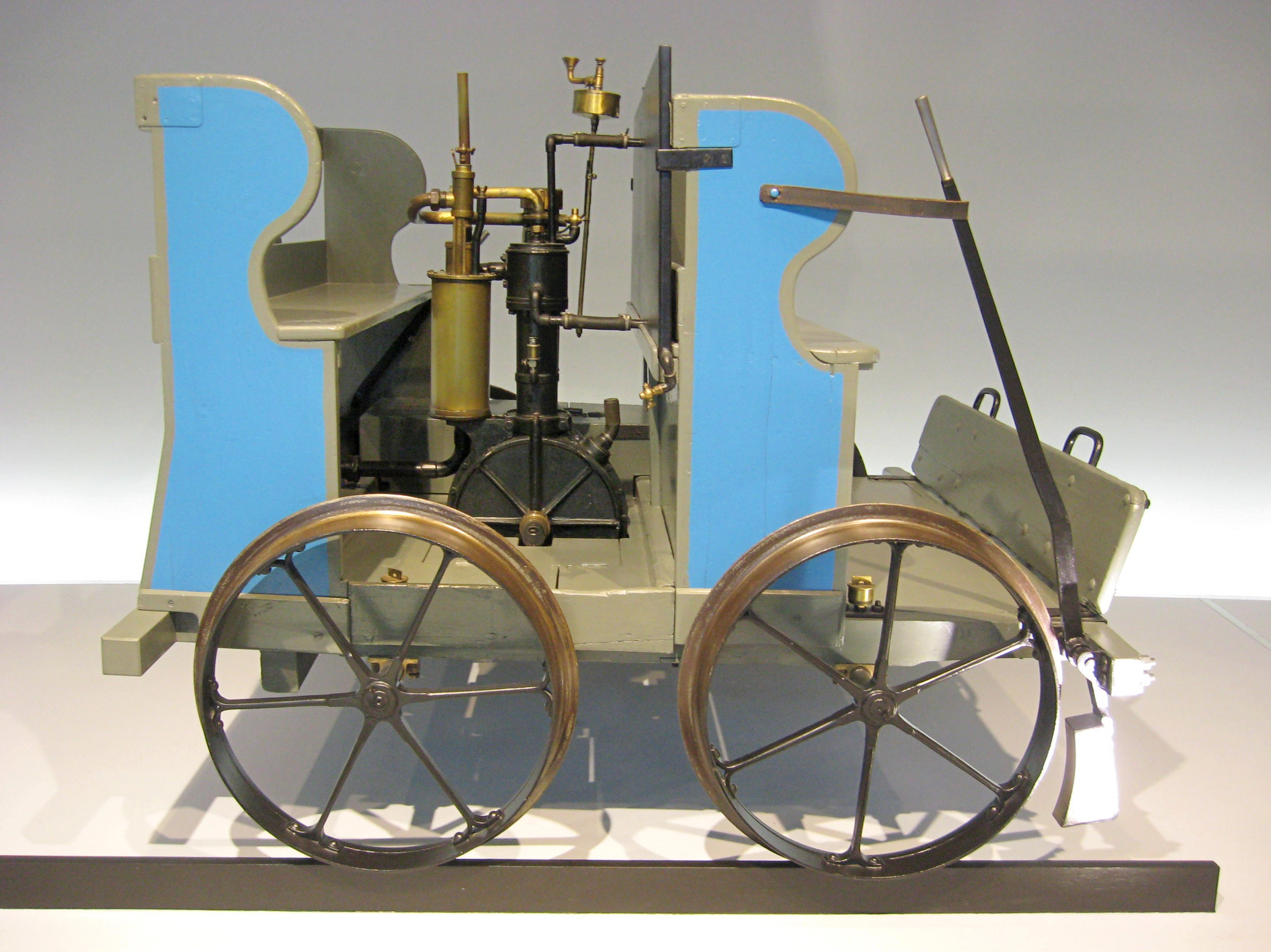 Draisine im Mercedes-Benz-Museum